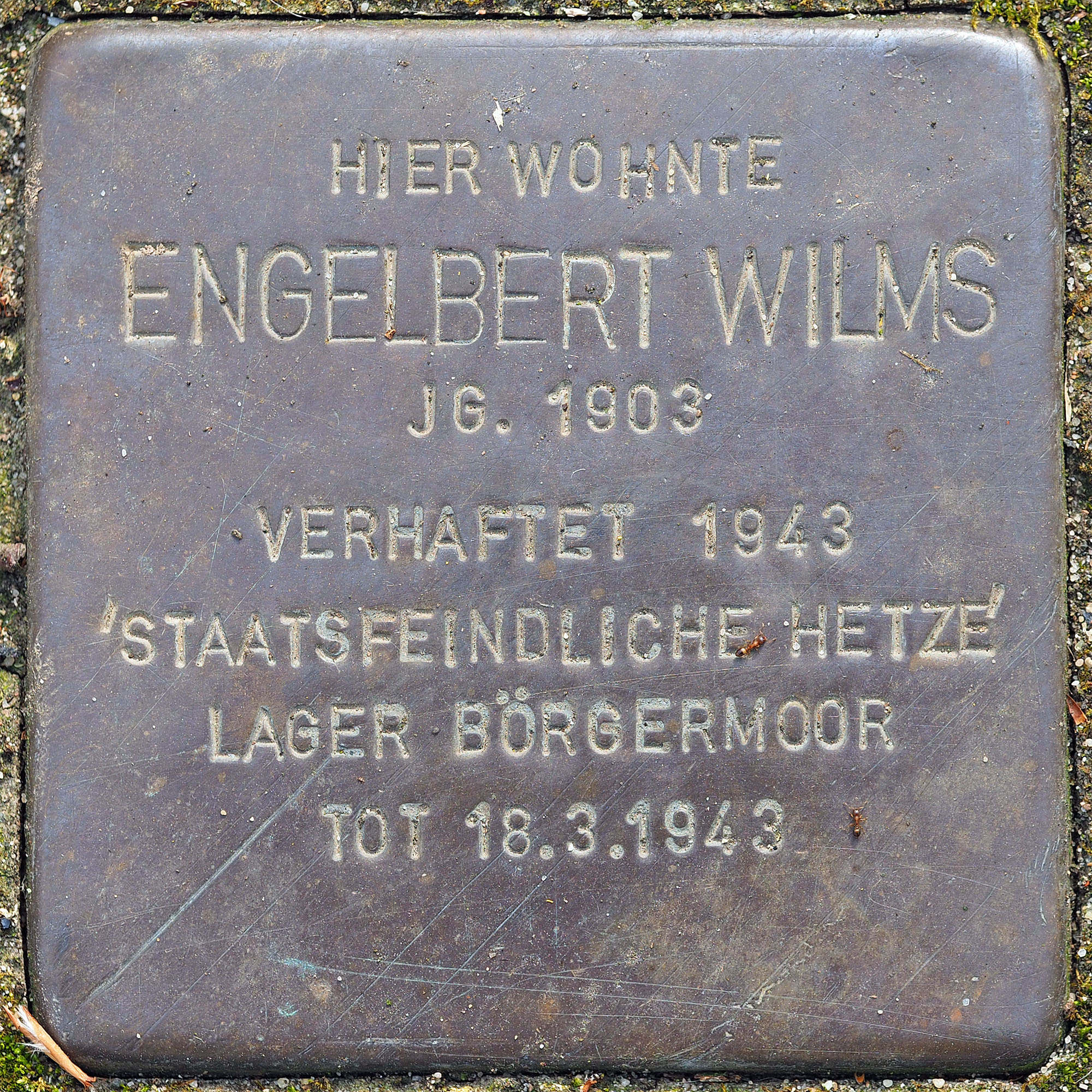 Stolpersteine MG: Wilms, Engelbert